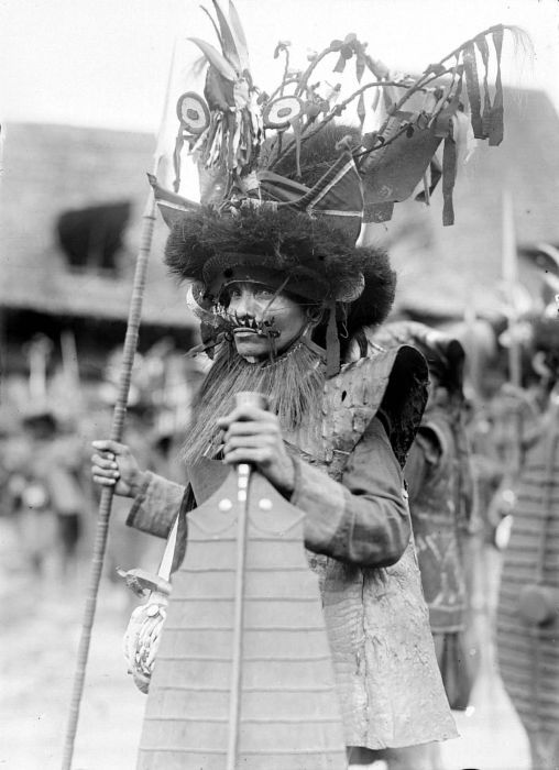 Negatief. Krijger van Zuid-Nias in vol ornaat